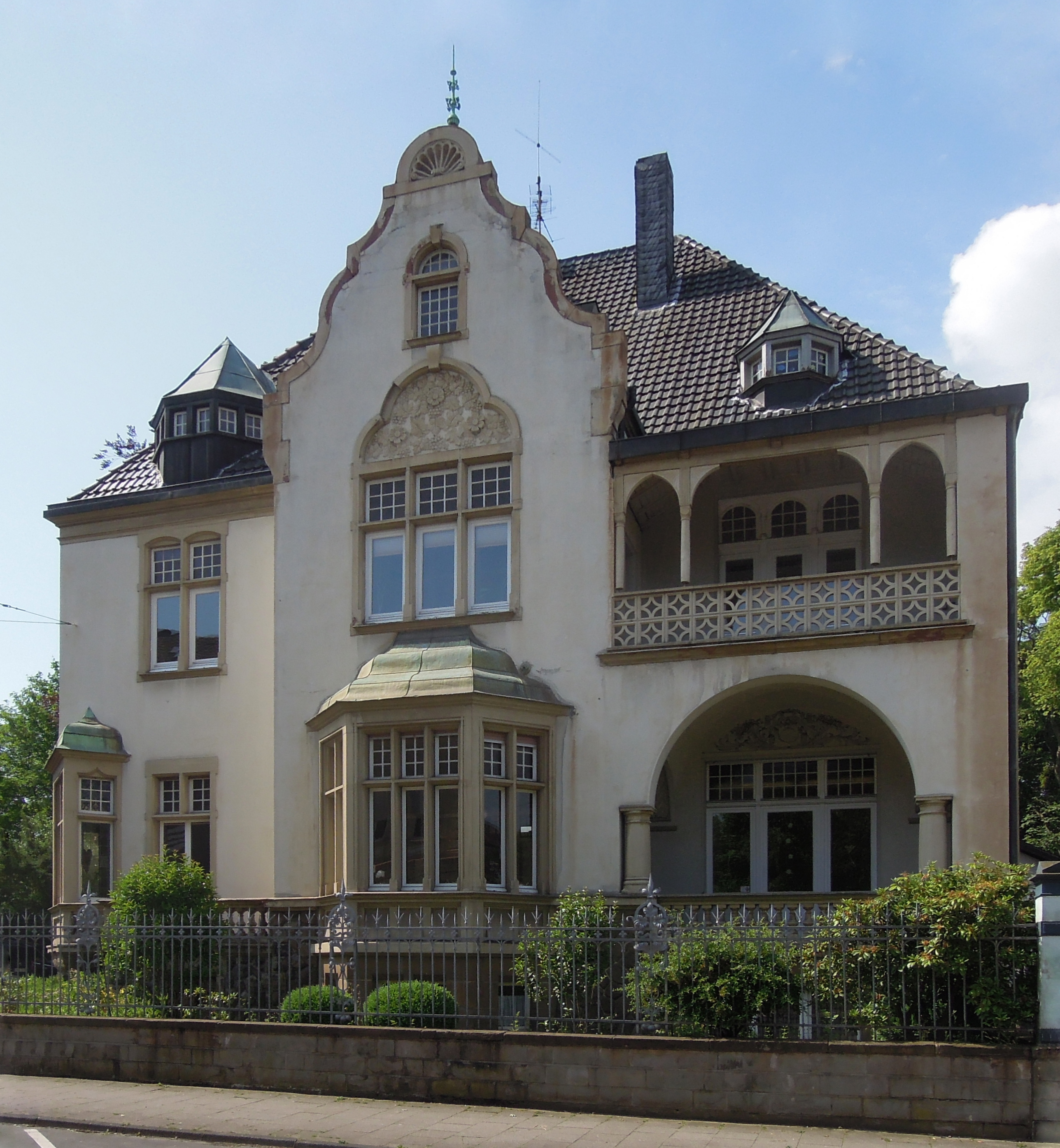 Baudenkmal Jugendstil-Villa, Bahnhofstraße 23 in Hattingen This is a photograph of an architectural monument.